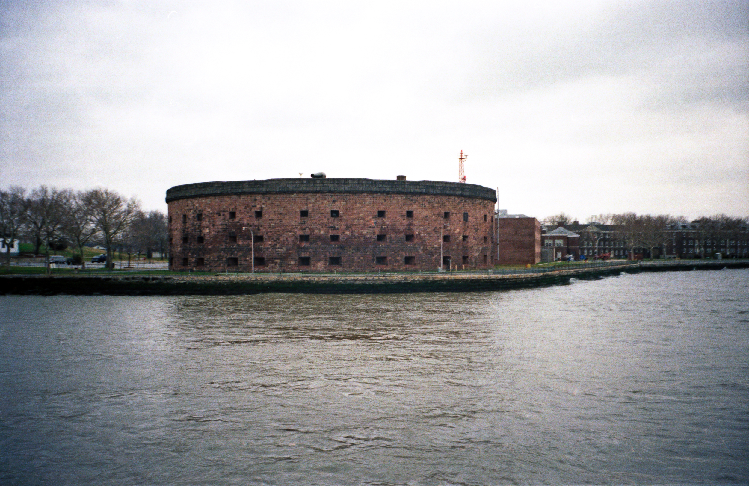 New York, New York, Governors Island, Castle Williams